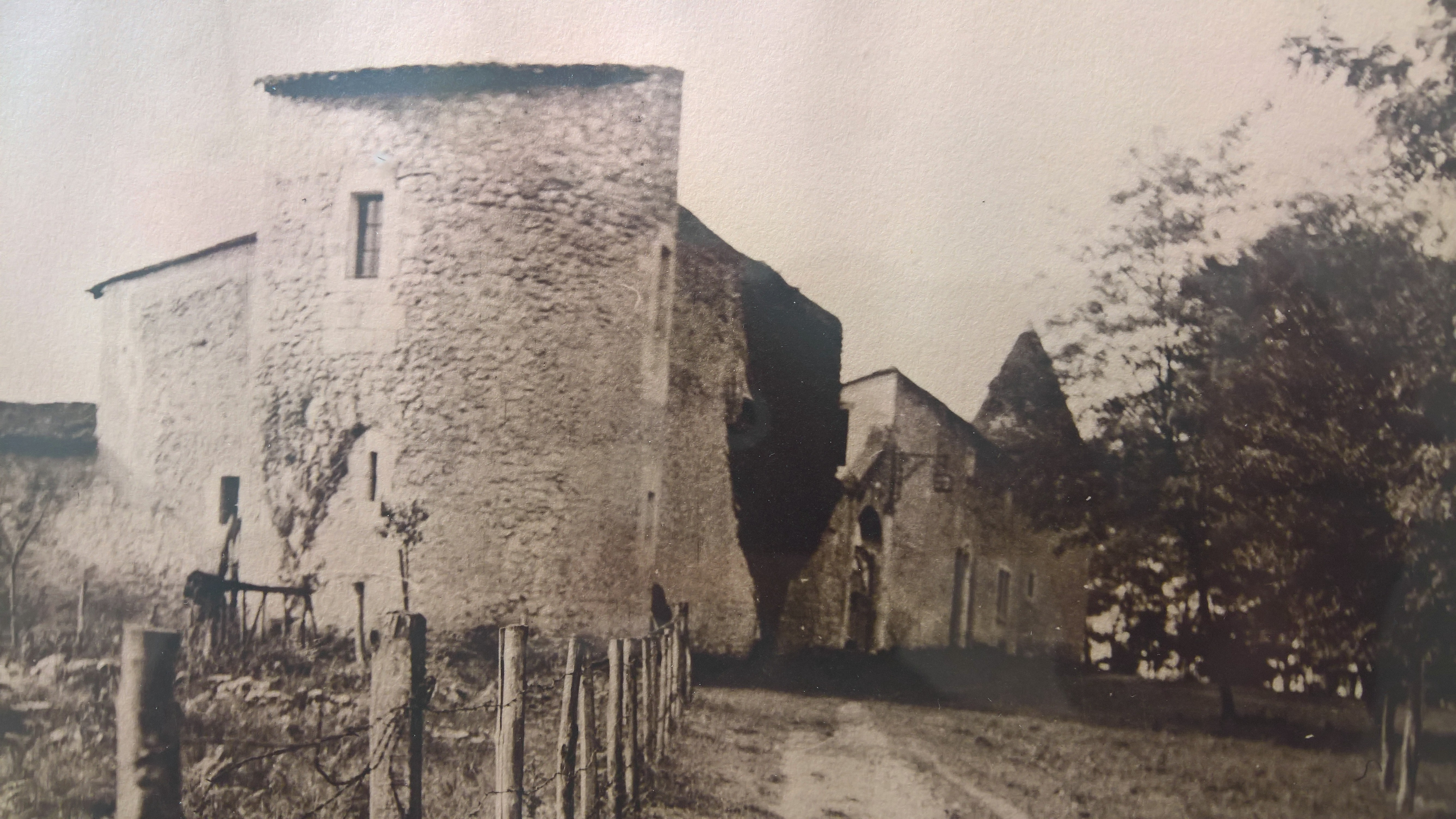 Photo prise dans les années 60 par Claude Reyné, fils du propriétaire. A cette époque l'autoroute n'existait pas encore. Le chemin d'accès au château était dans le prolongement de l'allée du château (Cadaujac/Gironde).